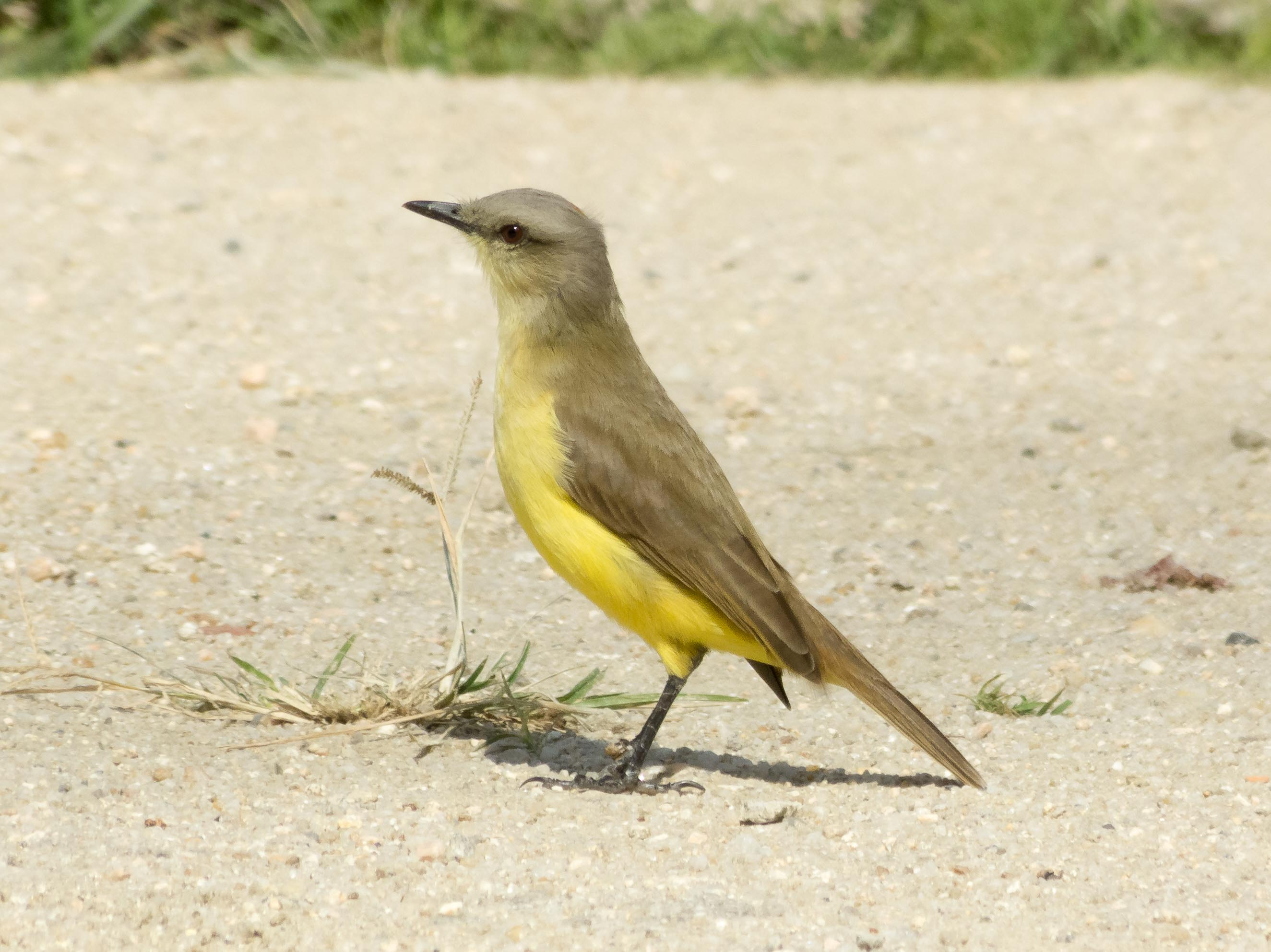 Suiriri-Cavaleiro da Barriga Amarela - Urca, Rio de Janeiro, Brasil.